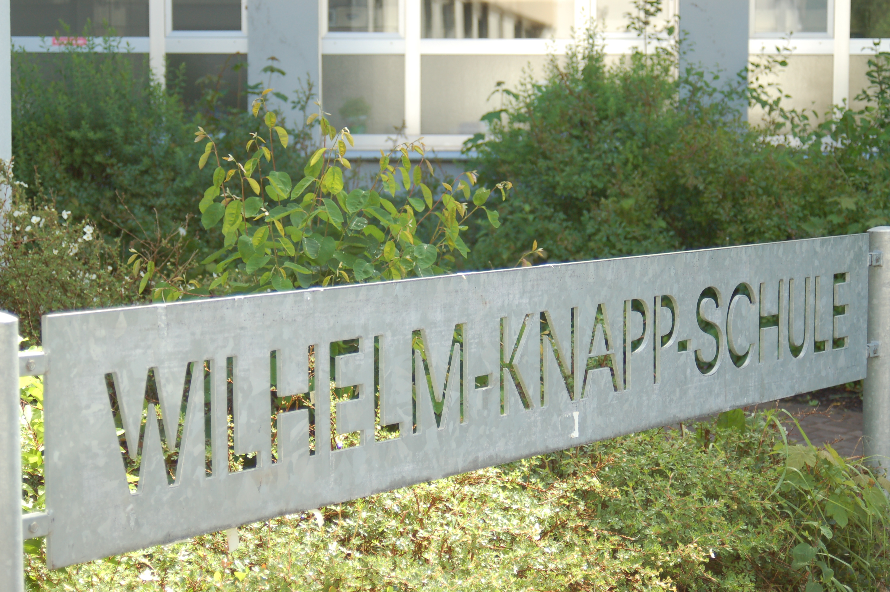 Weilburg Wilhelm Knapp Schule Schild Nr.2